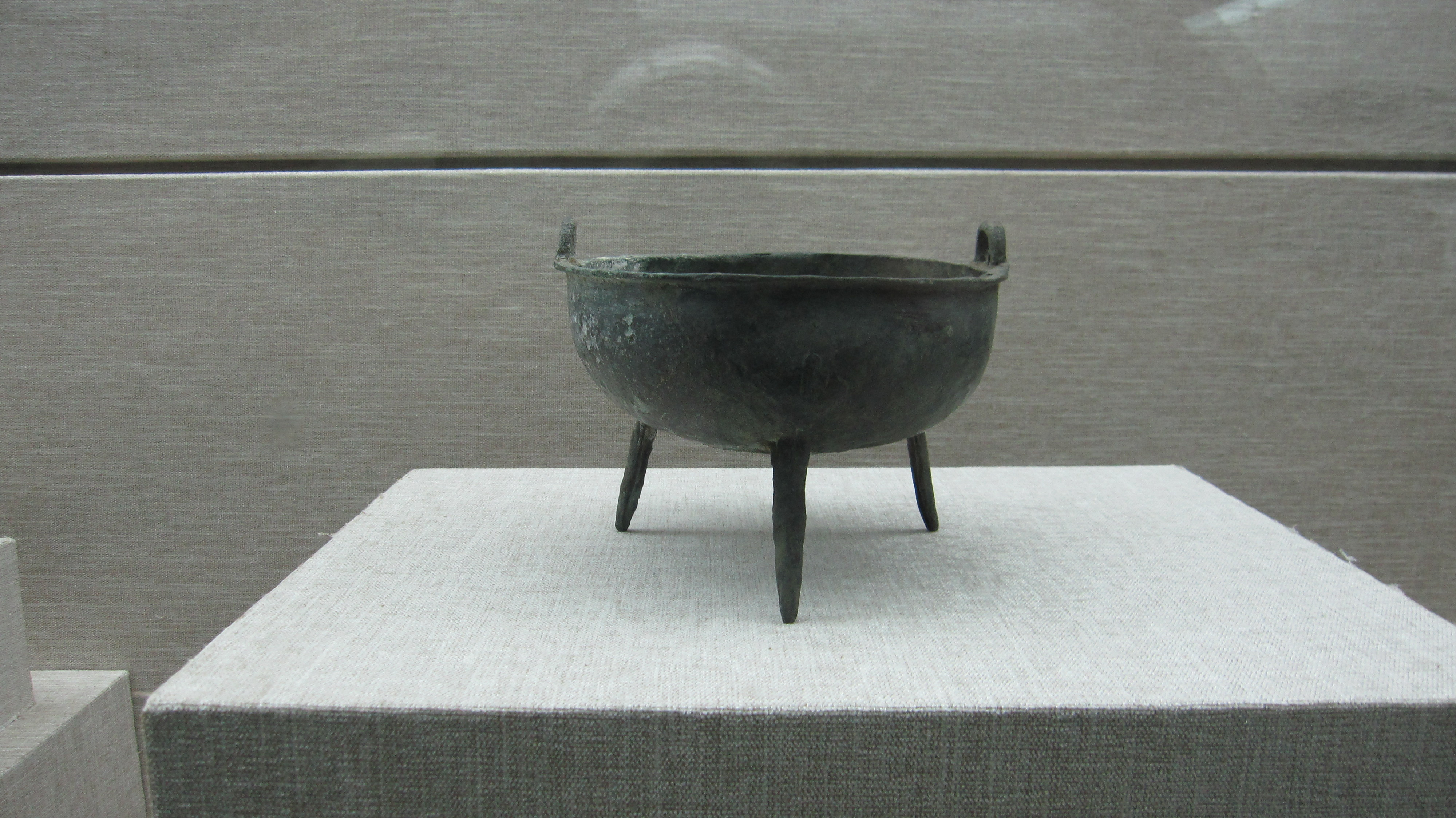 衡阳市博物馆展出的重环纹铜鼎，春秋时期青铜器，1988年9月衡阳县赤石乡出土。